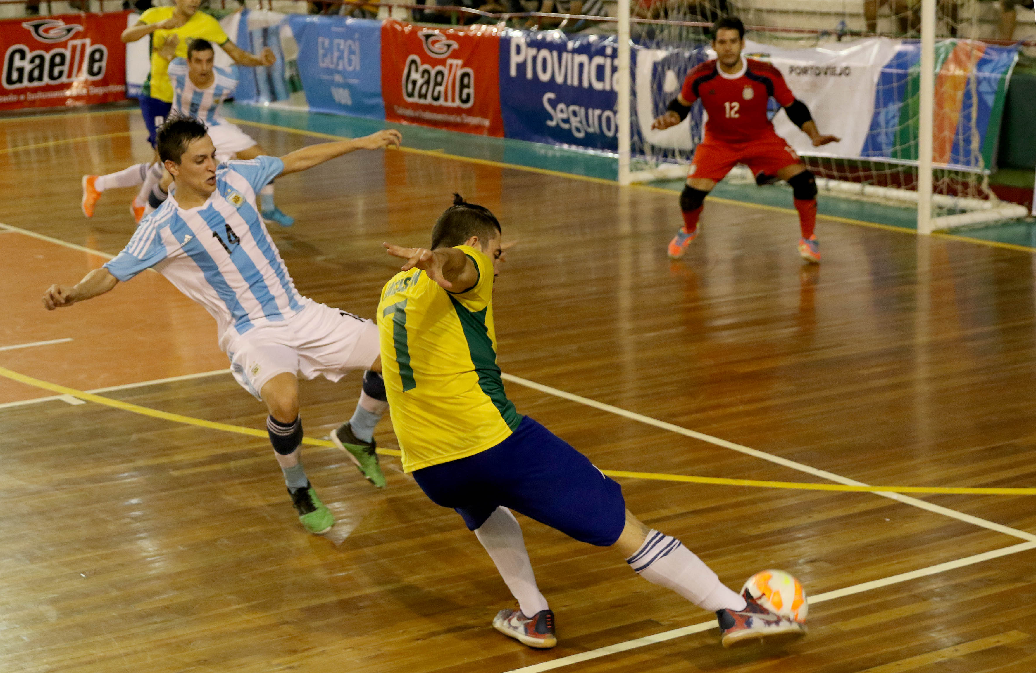 Portoviejo, Manabí, 29 de ago del 2015 (Andes).-La selección de Argentina venció en penales a Brasil y clasificó a la final de la Copa América de fútbol sala que se realíza en Portoviejo, Manabí. Foto:César Muñoz/Andes